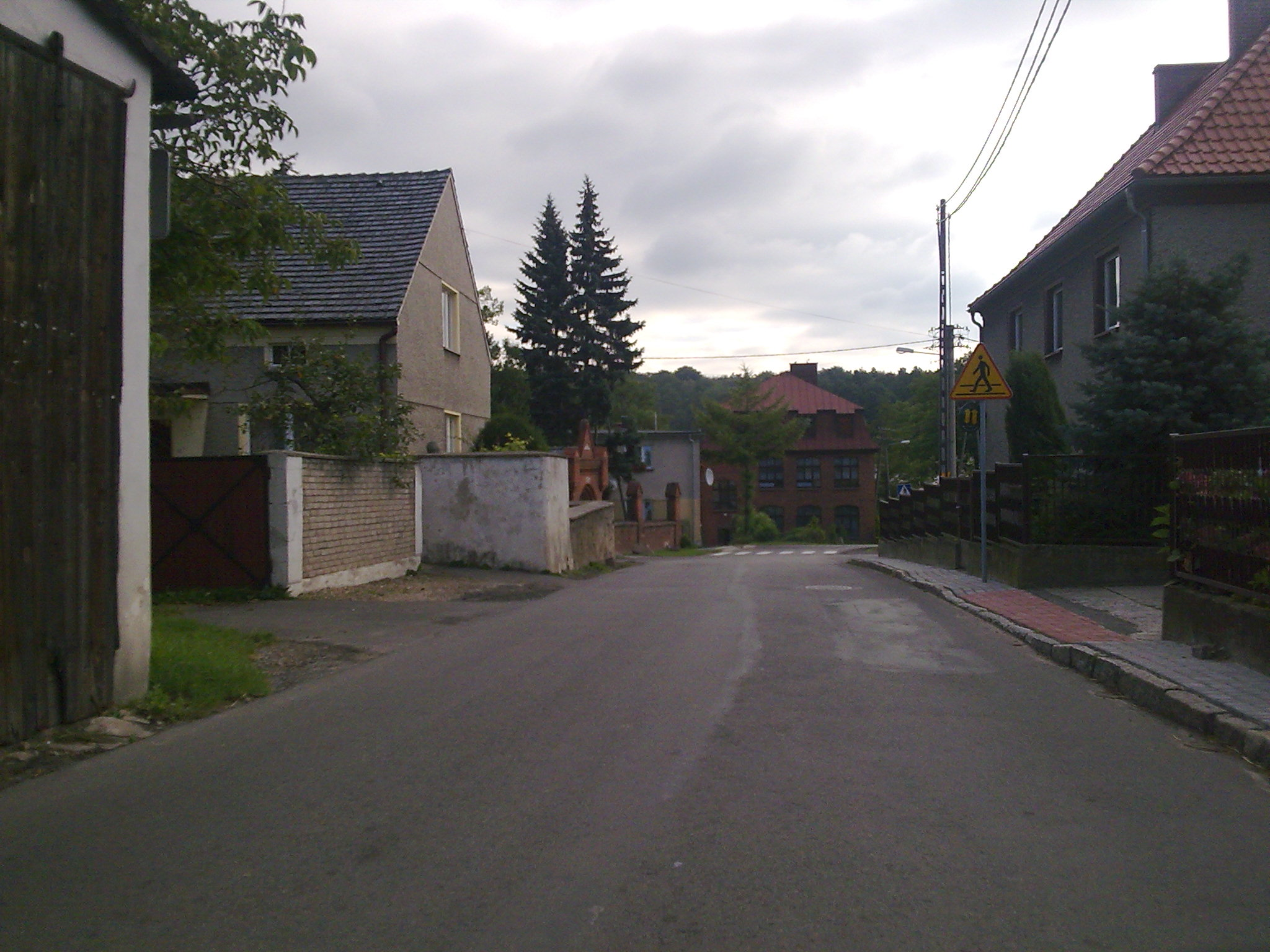 jedna z ulic w Jaryszowie nieopodal koscioła